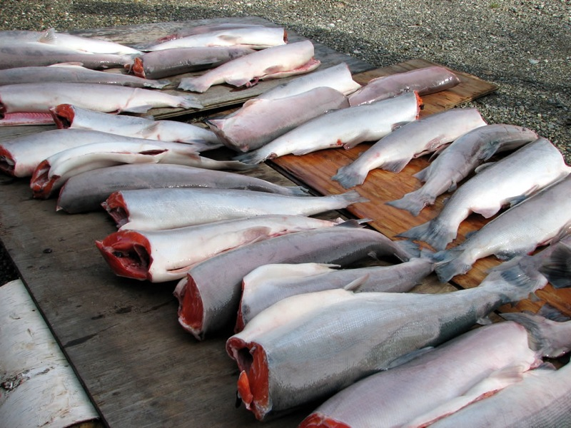 Copper River sockeyes